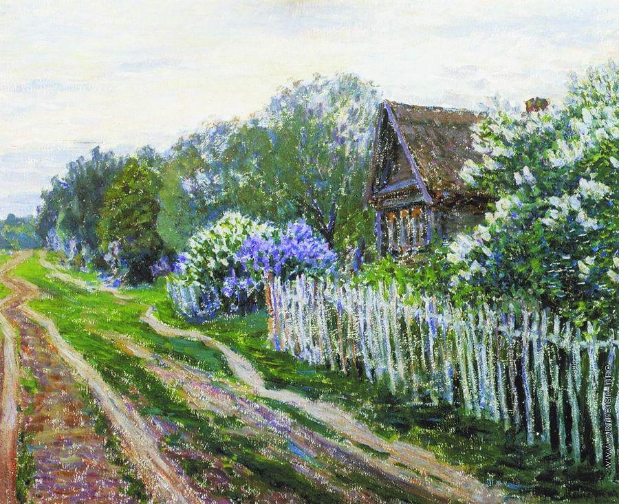 Мещерин Н. (1864-1916). Название Пейзаж Год создания 1905 Материал Холст, масло Размер 64,5 x 80 Собрание Ивановский областной художественный музей